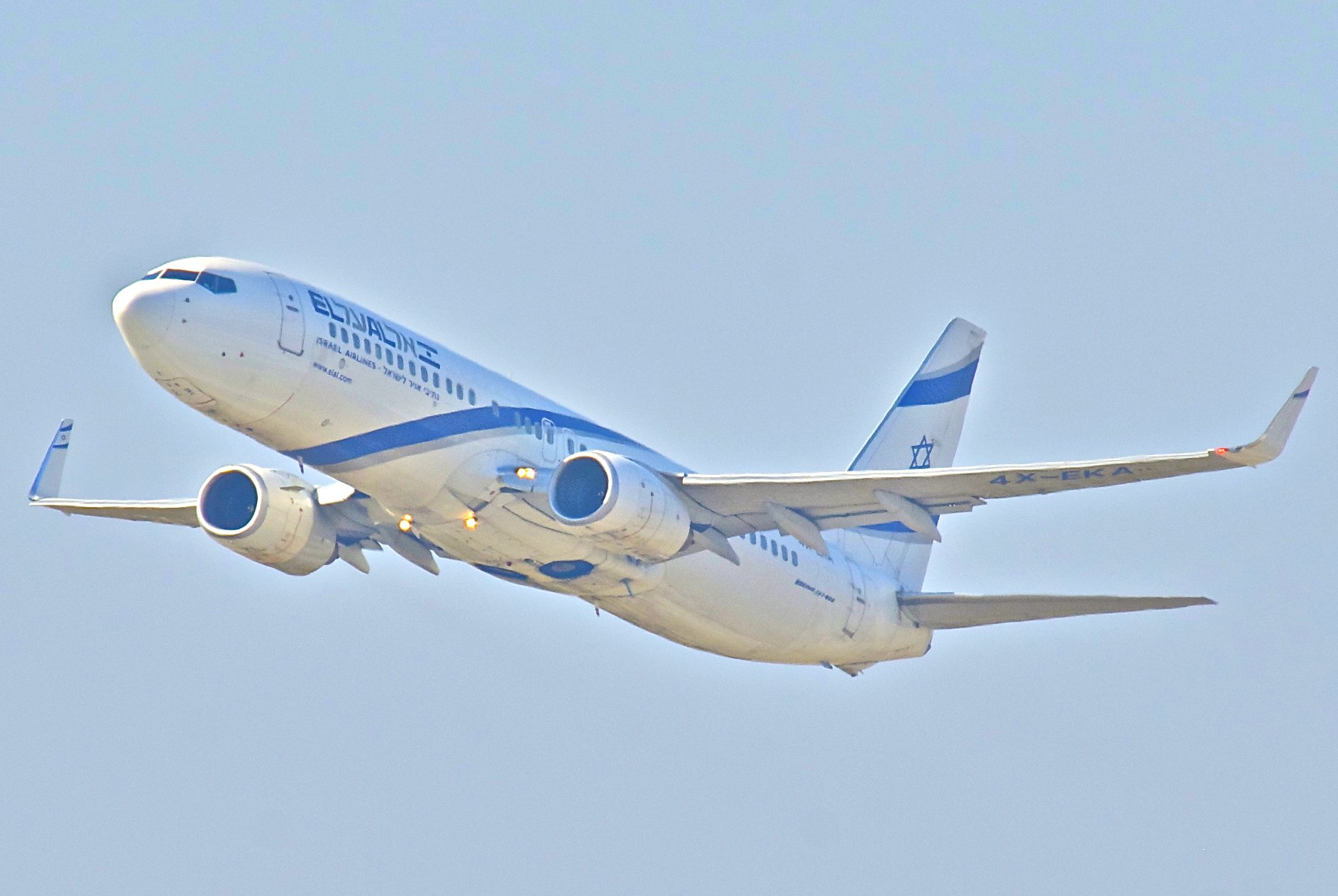 El Al Boeing 737-800; 4X-EKA@ZRH;14.03.2012/644ah